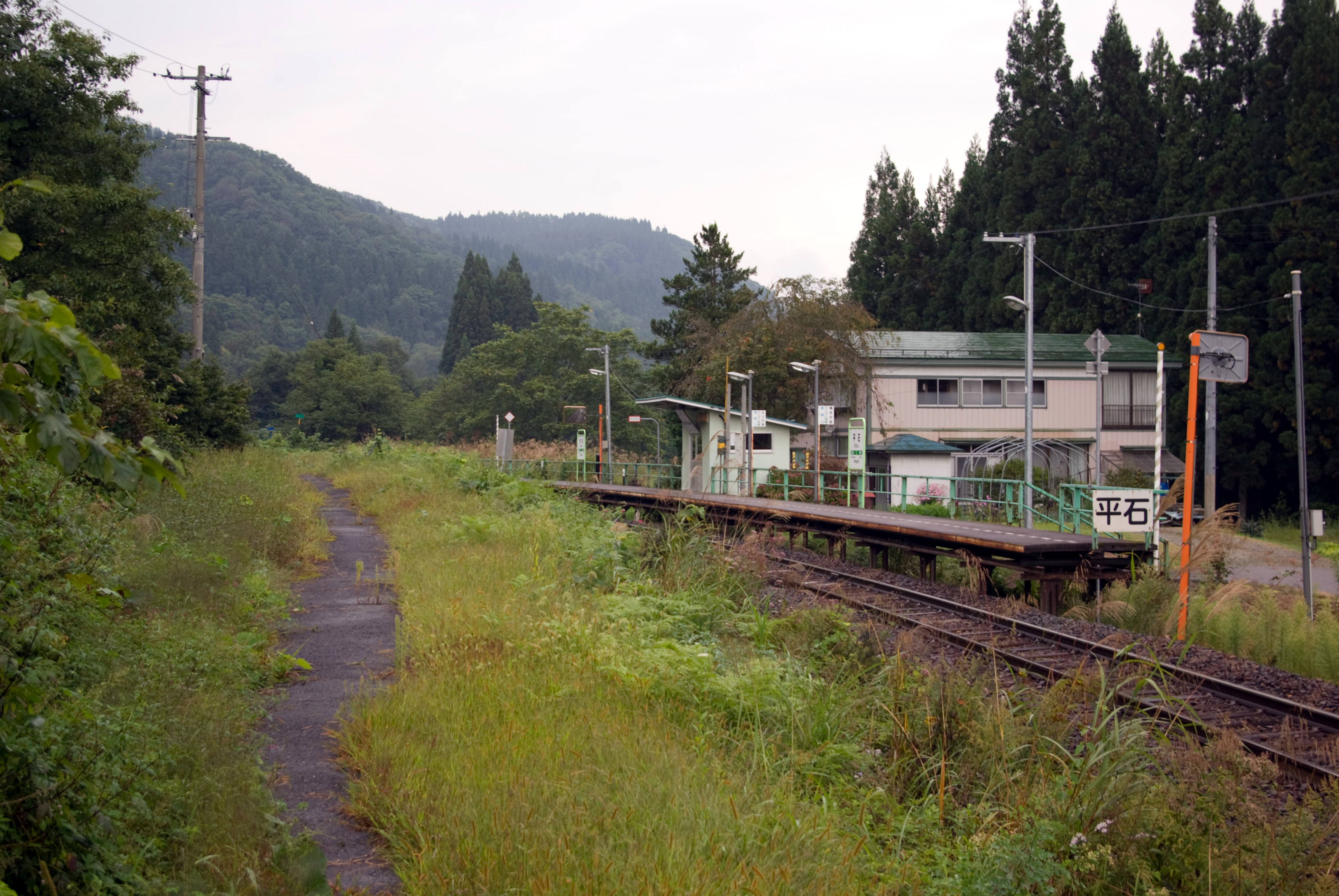 東日本旅客鉄道株式会社北上線平石駅